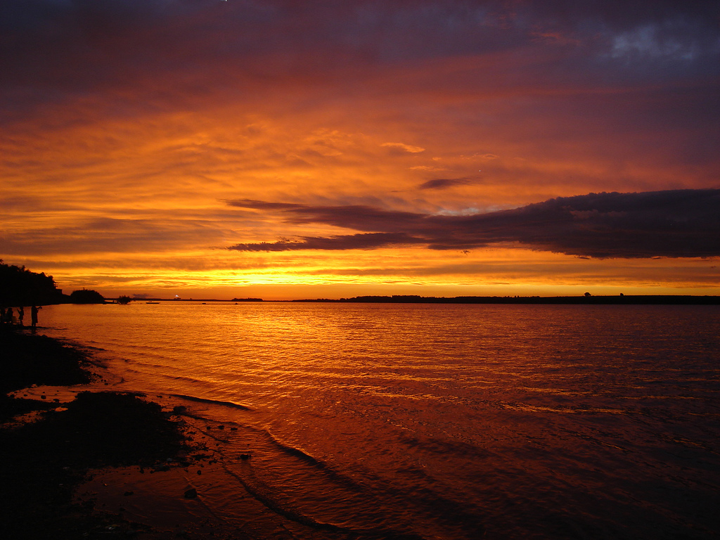 Pôr do Sol em Uruguaiana